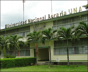 fondo universidad nacional agraria